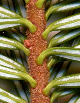 Abies amabilis shoot (enlarged) it: Abies amabilis inserzione degli aghi, visibili le linee stomatifere